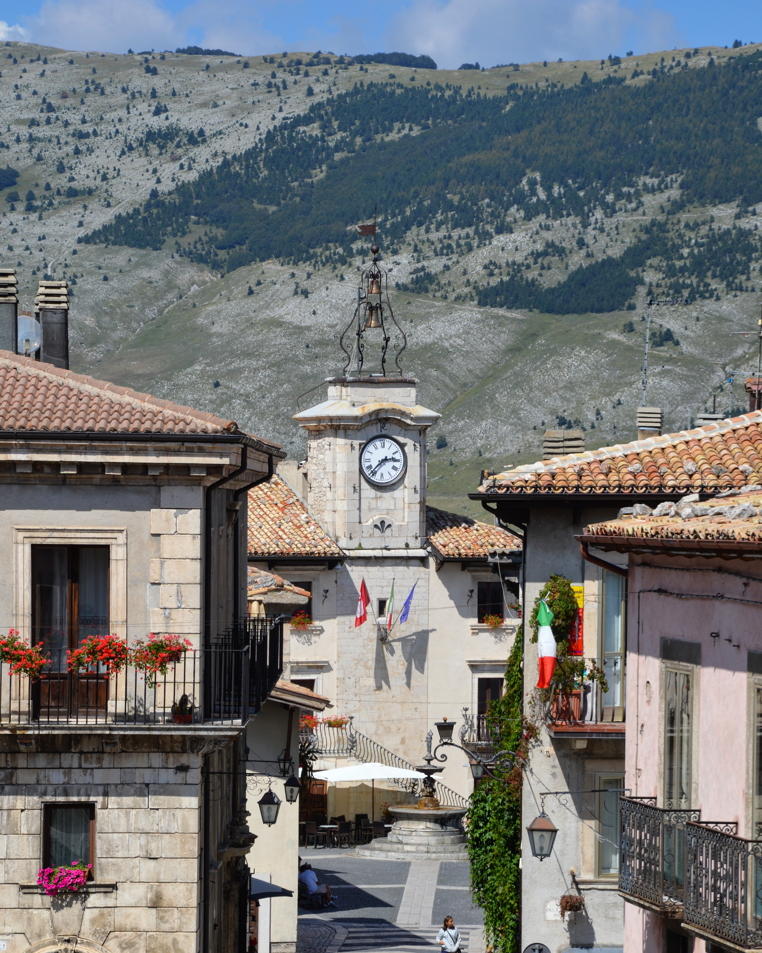 Pescocostanzo